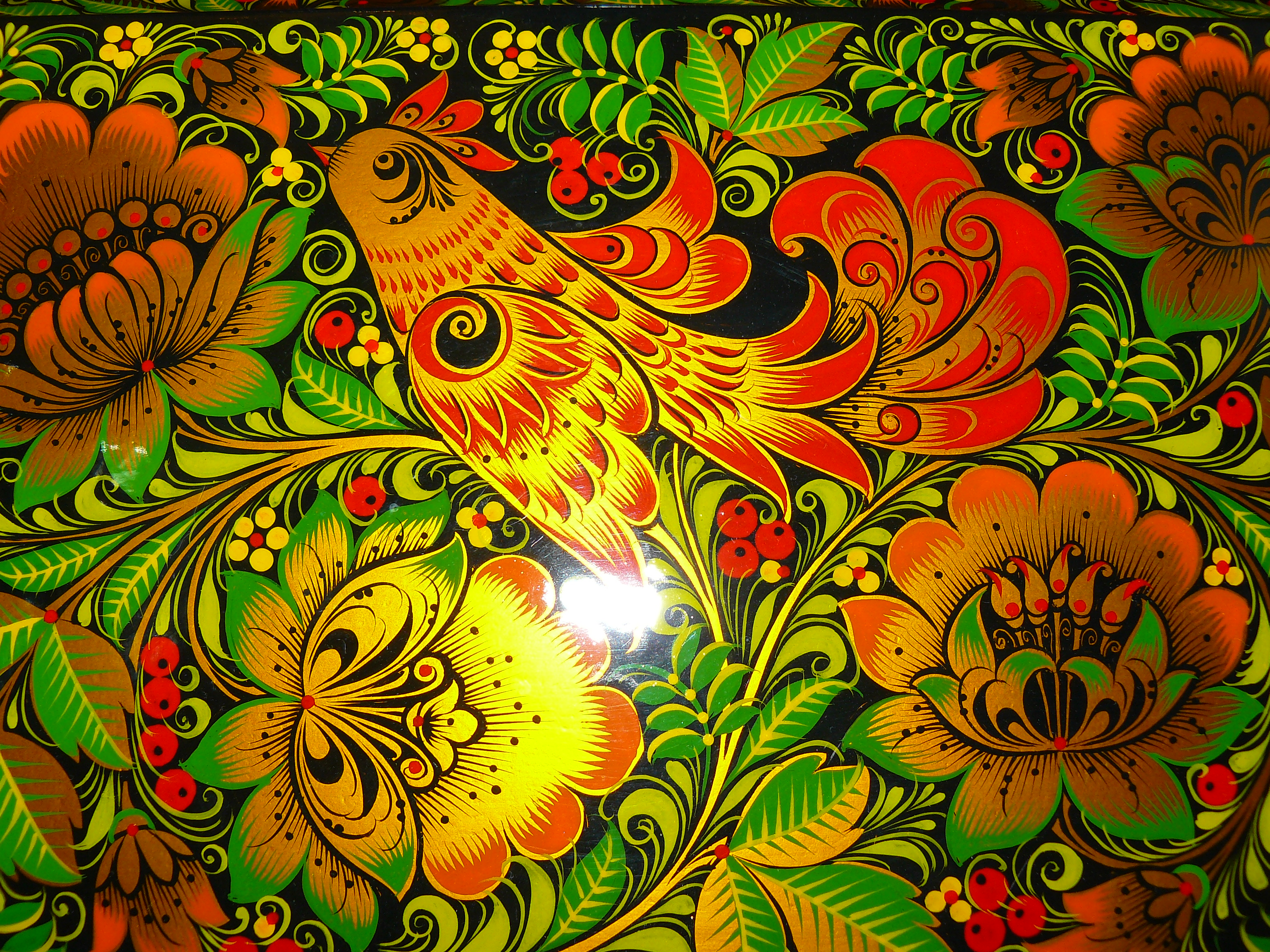 Крышка шкатулки с хохломской роспись, Семенов, 2000-е гг.